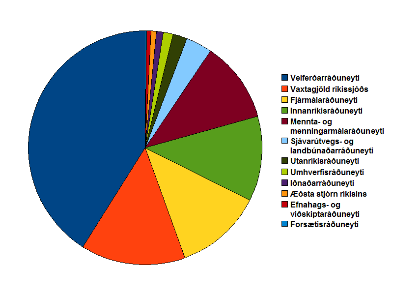 Fjárlög íslenska ríkisins 2011